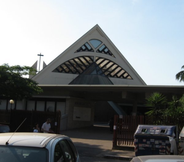 Chiesa di S. Giuseppe Moscati a Roma